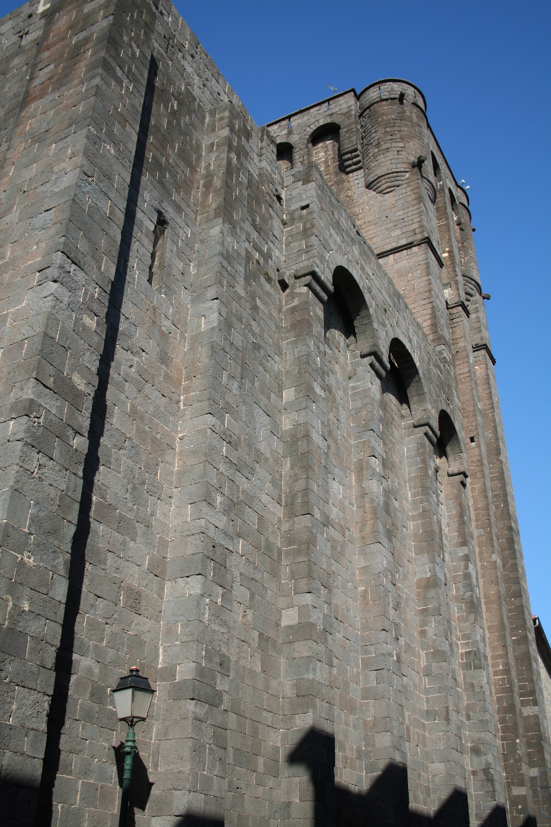 Agde (Hérault) - cathédrale Saint-Étienne.